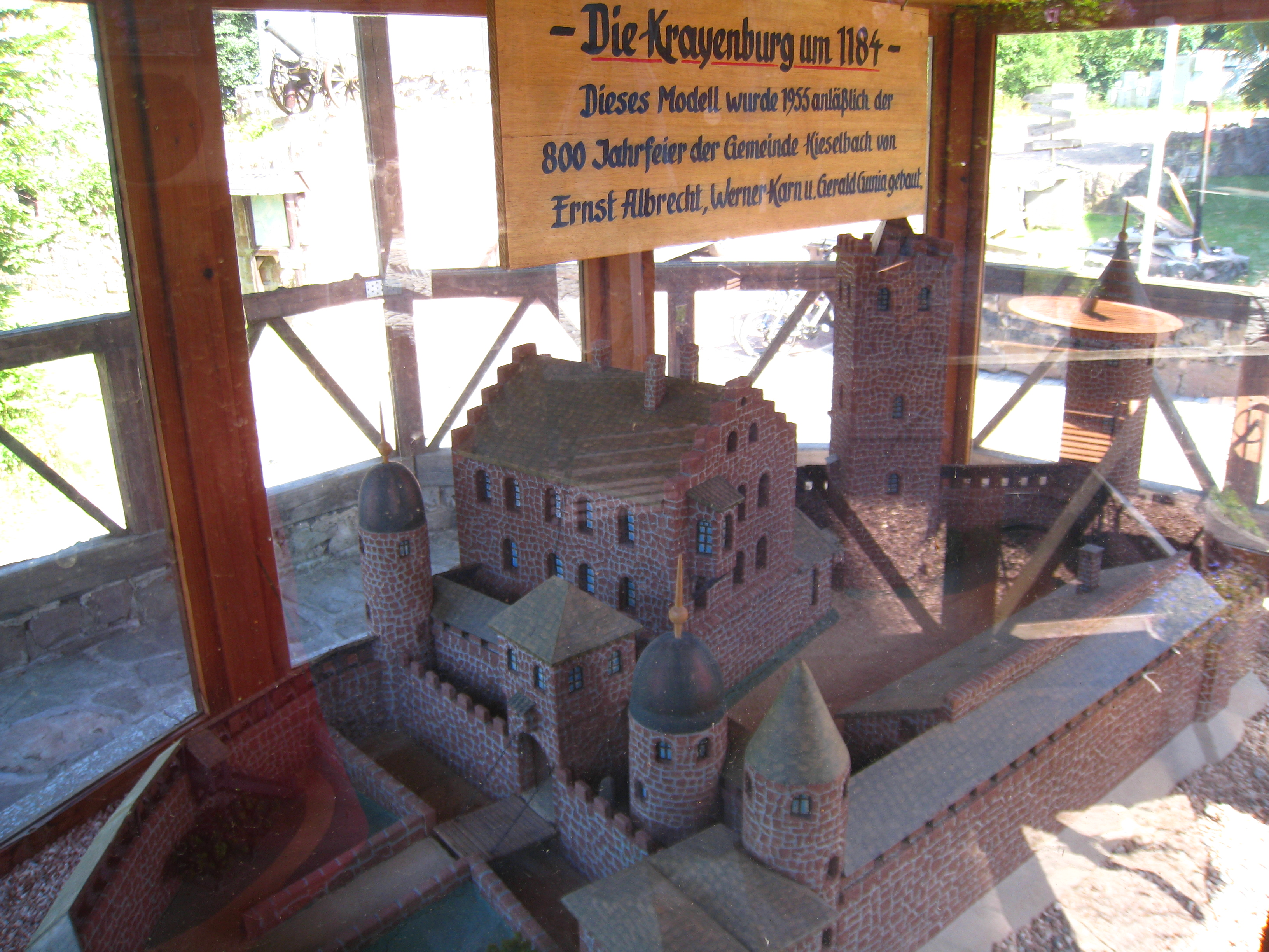 Makieta zamku Krayenburg odtworzona na podstawie źródeł historycznym wyeksponowana na terenie ruin zamku